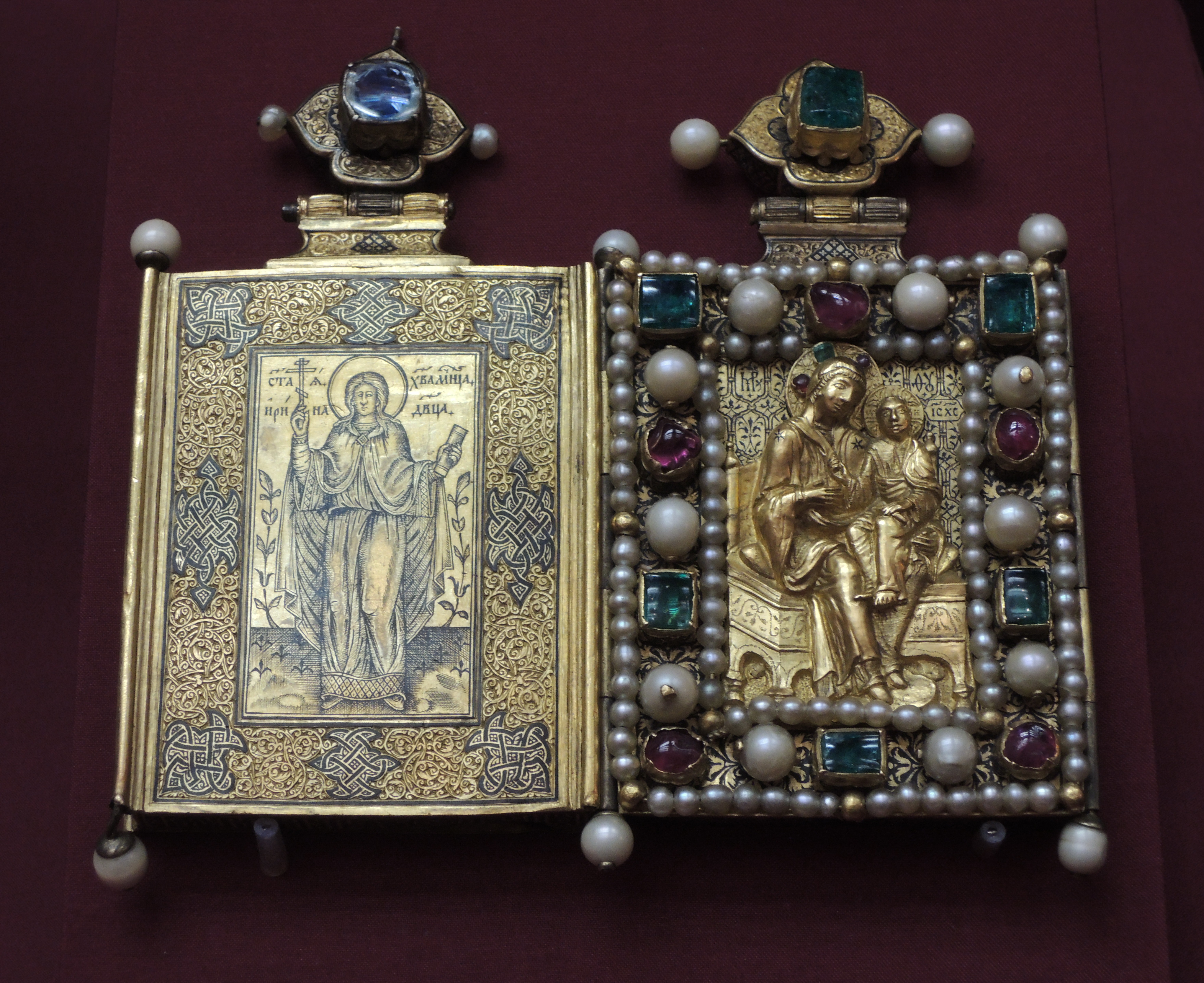 Икона-мощевик царицы Ирины Федоровны Мастерские Московского Кремля 1589 Золото, камни драгоценные, жемчуг Чернь, чеканка, литье Длина с оглавием: 11.8 см. Ширина: 6.5 см. Выполнен по указу царя Федора Иоанновича для царицы Ирины Федоровны Годуновой в 1589 г. На одной из сторон золотого ковчежца, сделанного в 1589 году по указу царя Федора Ивановича для его жены, царицы Ирины Федоровны Годуновой, помещено черневое изображение ее небесной покровительницы — мученицы Ирины со свитком и крестом в руках. Фронтально развернутая на зрителя торжественная фигура святой в ниспадающей тяжелыми складками одежде, несмотря на миниатюрность, поражает своей монументальностью и значительностью, заставляющей вспомнить памятники древнерусского изобразительного искусства. В густой теневой штриховке, имитирующей гравюрную технику и нанесенной по контуру фигуры, можно видеть стремление к объемной моделировке изображения. Золотой ковчежец является реликварием для хранения христианских святынь. Не исключено, что его создание было связано с поставлением в Москве в 1589 году первого русского патриарха Иова константинопольским патриархом Иеремией, который по случаю этого знаменательного события подарил царю и царице ценные реликвии.